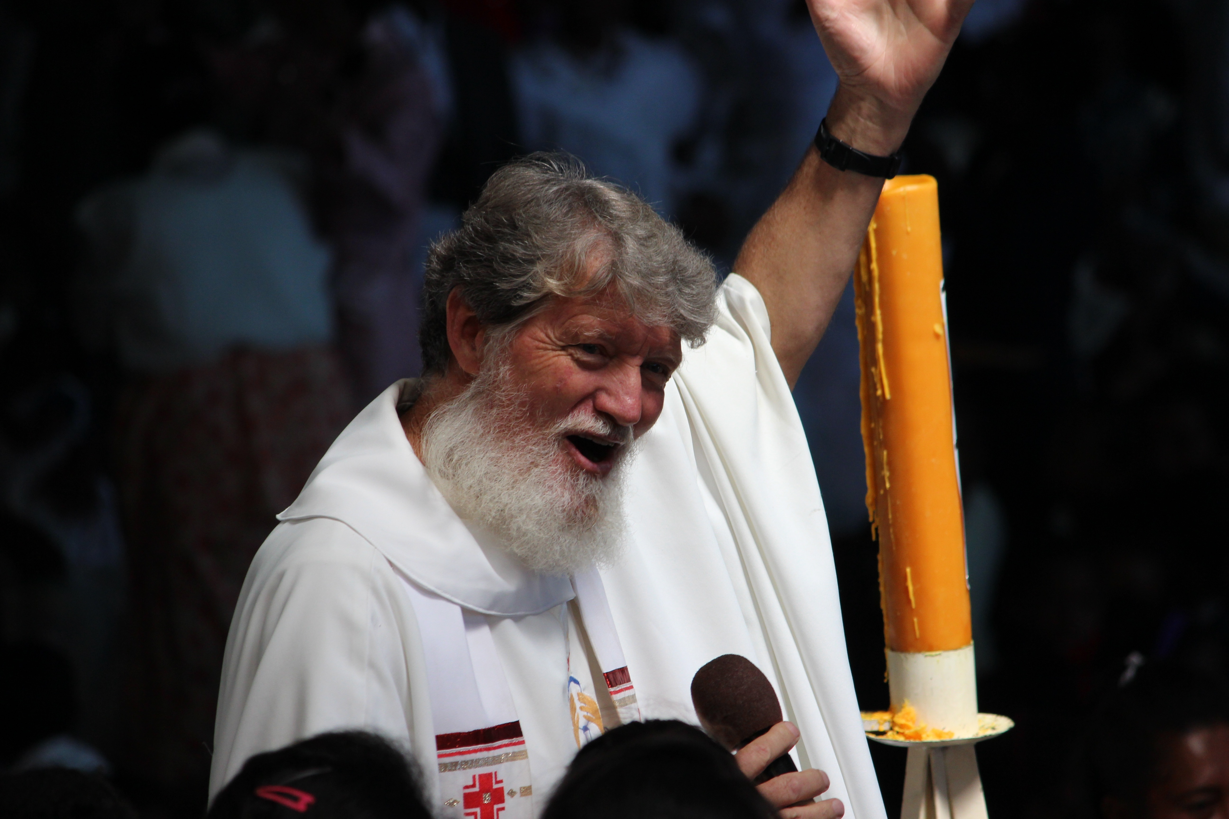 Office dominical à Akamasoa - 20 avril 2014